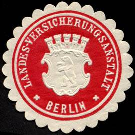 Sealing stamp Title: Landesversicherungsanstalt - Berlin Description: rot, weiß, geprägt Place: Berlin size: 4 cm